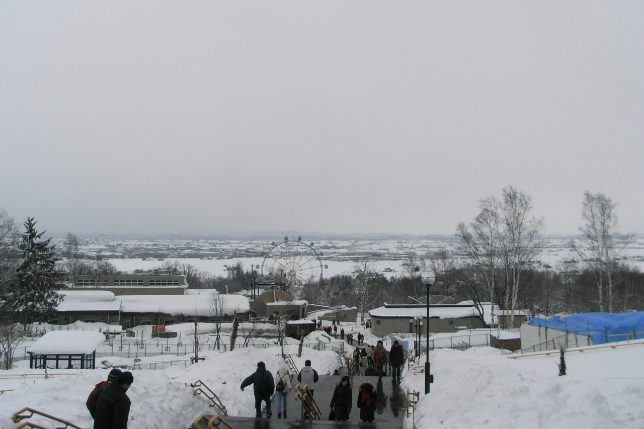 旭山動物園で撮った写真です。 東門前から正門方向。なだらかな傾斜地に旭山動物園は建っています。